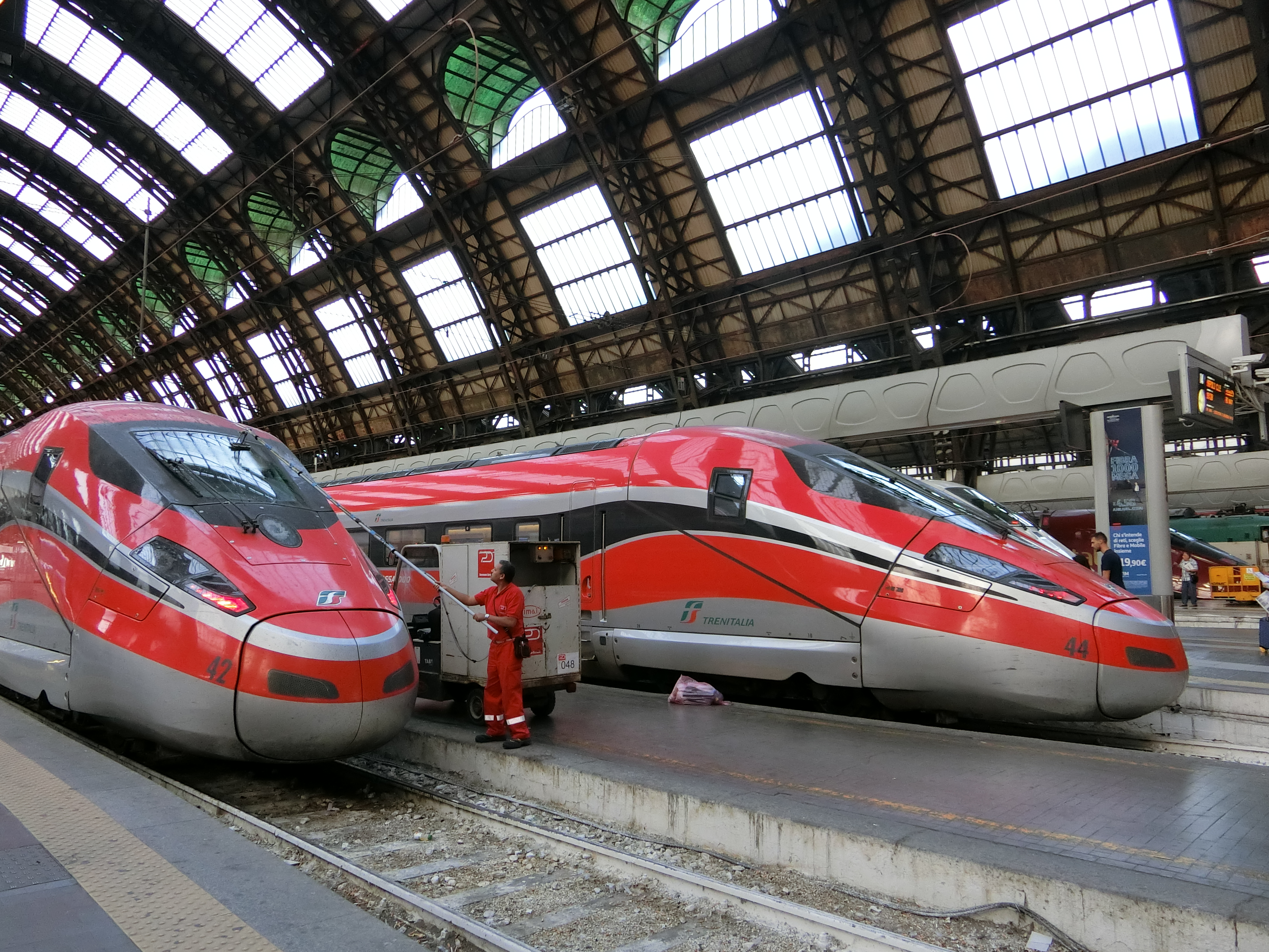 乗れなかったやつ